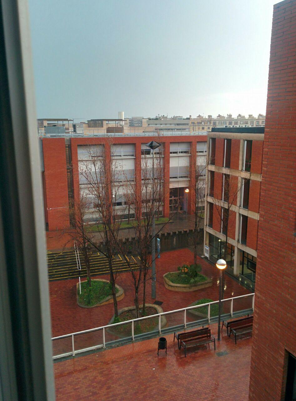 روز بارانی UPC